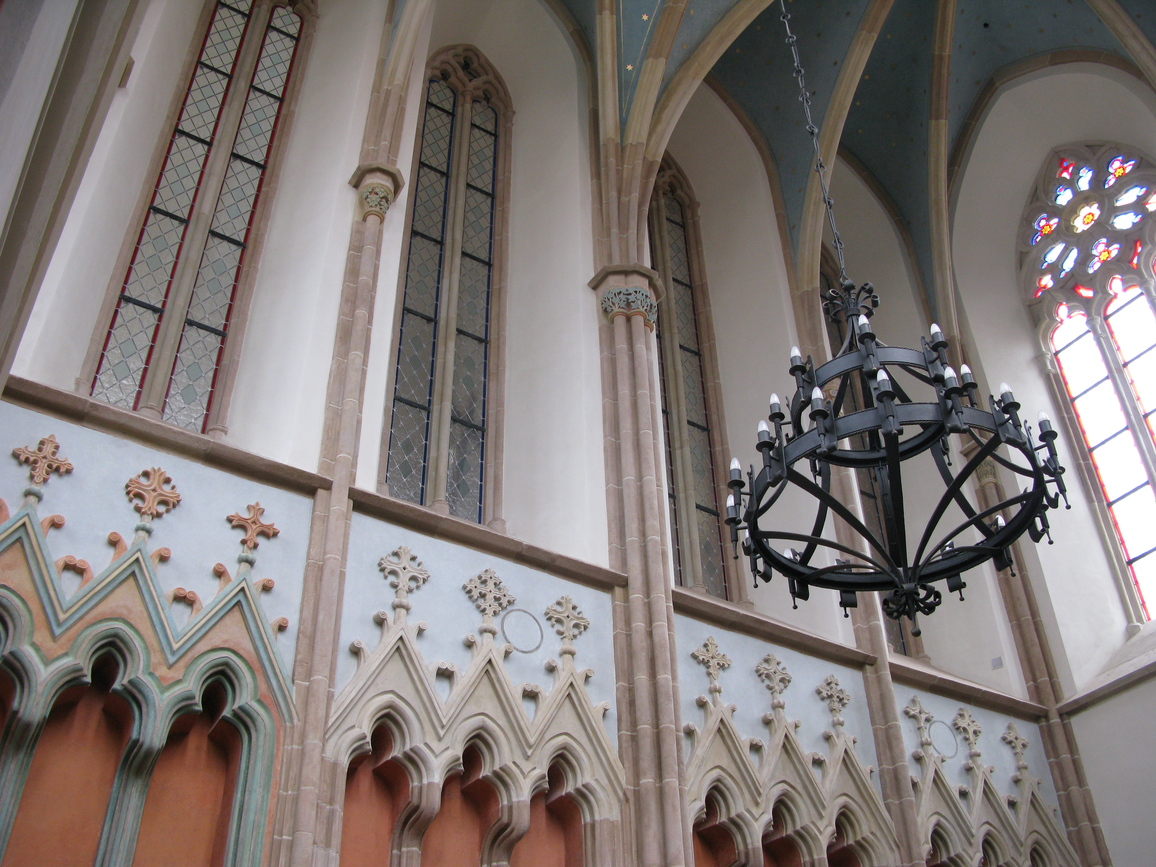 okna, podpory, osvětlení